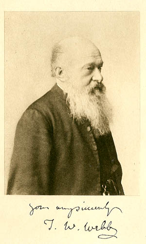 T.W. Webb